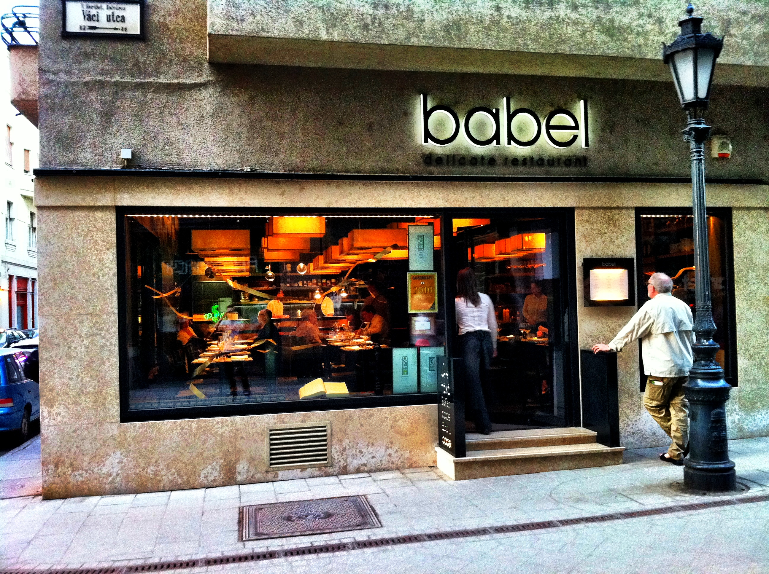 Babel Delicate Restaurant, Budapest - Closed?